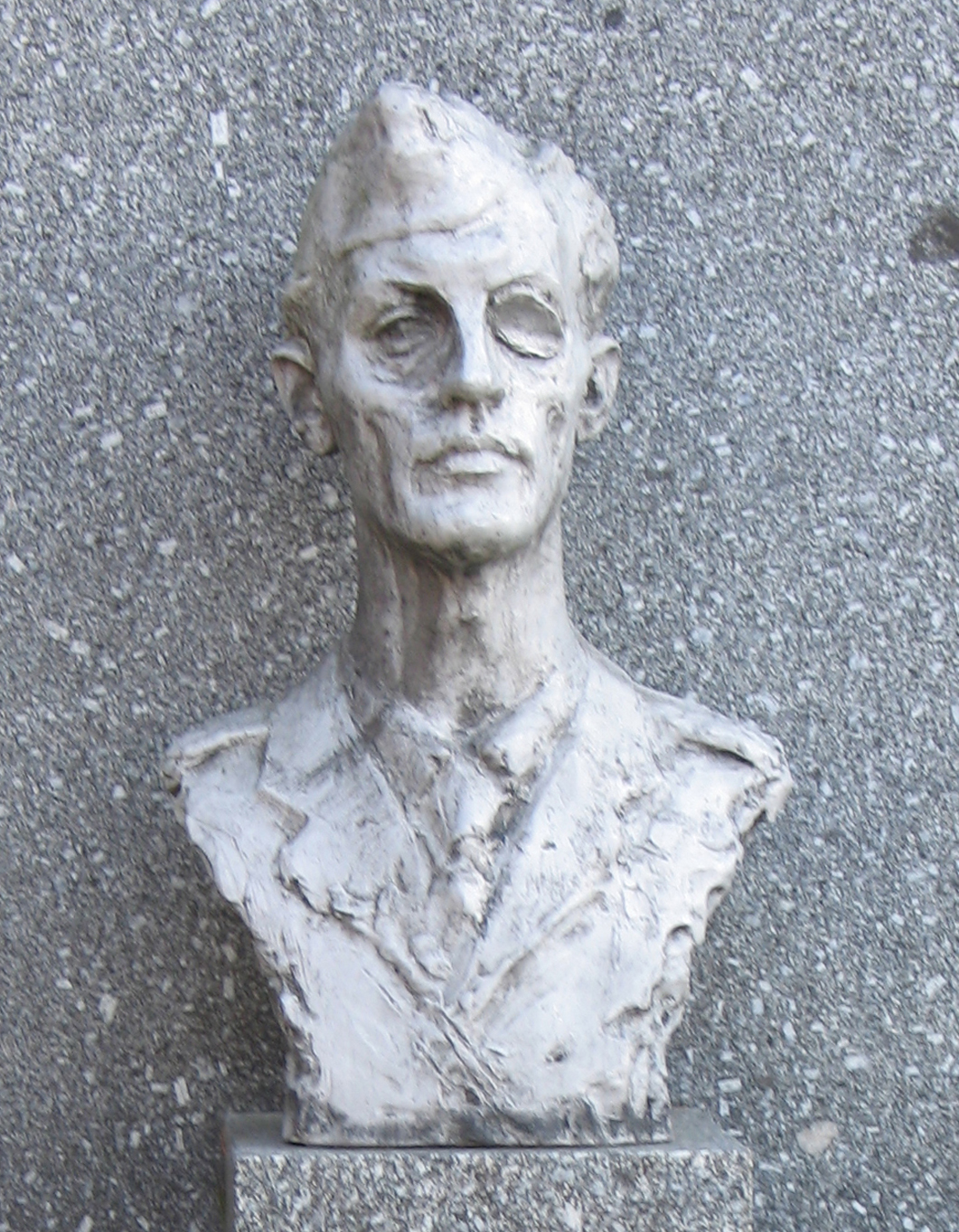 Dukla, Alej hrdinov generálmajor Ruchard Tesařík